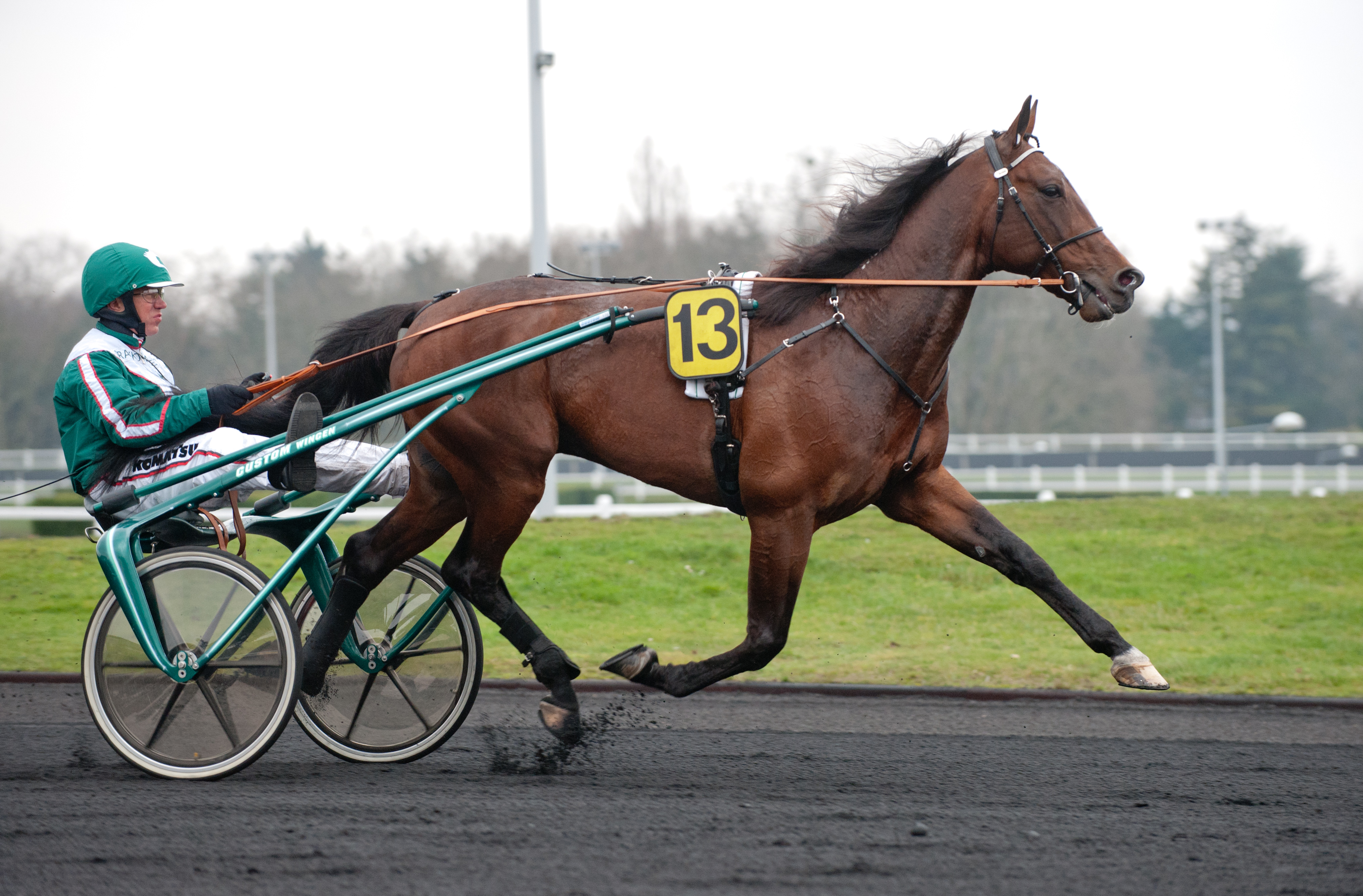 Örjan Kilhström och travaren Maharajah.